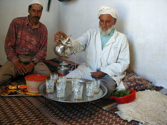 Walon: li mwaisse del måjhon vude li té po les priyîsلمغربية: مول دار كيوجد اتاي لدّيافWalon: L'hôte prépare le thé pour les invités